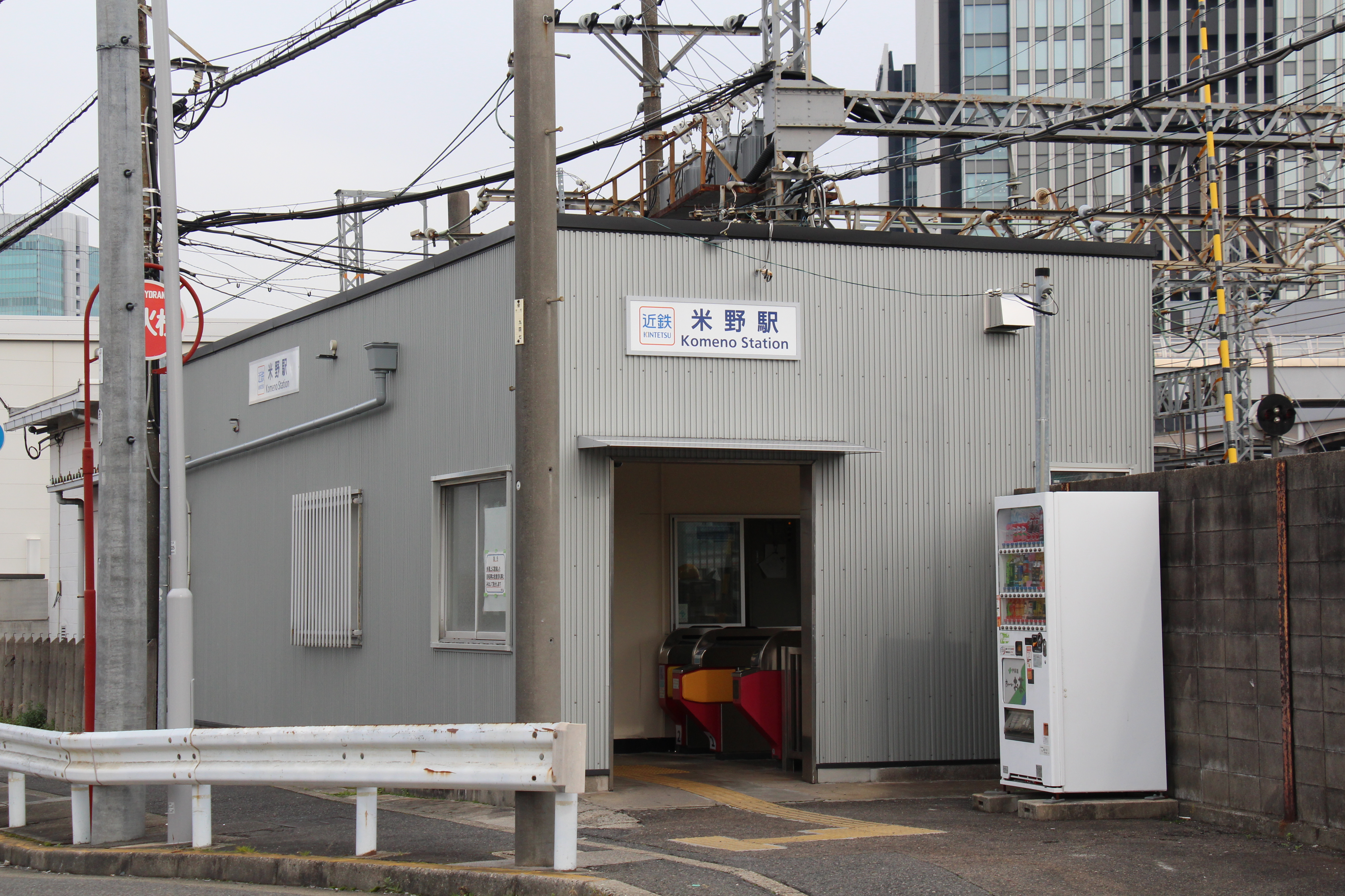 米野駅の駅舎を西側から撮影した。